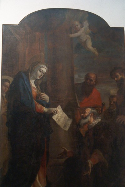 Mattia Preti, Madonna della lettera, Museo Regionale di Messina.